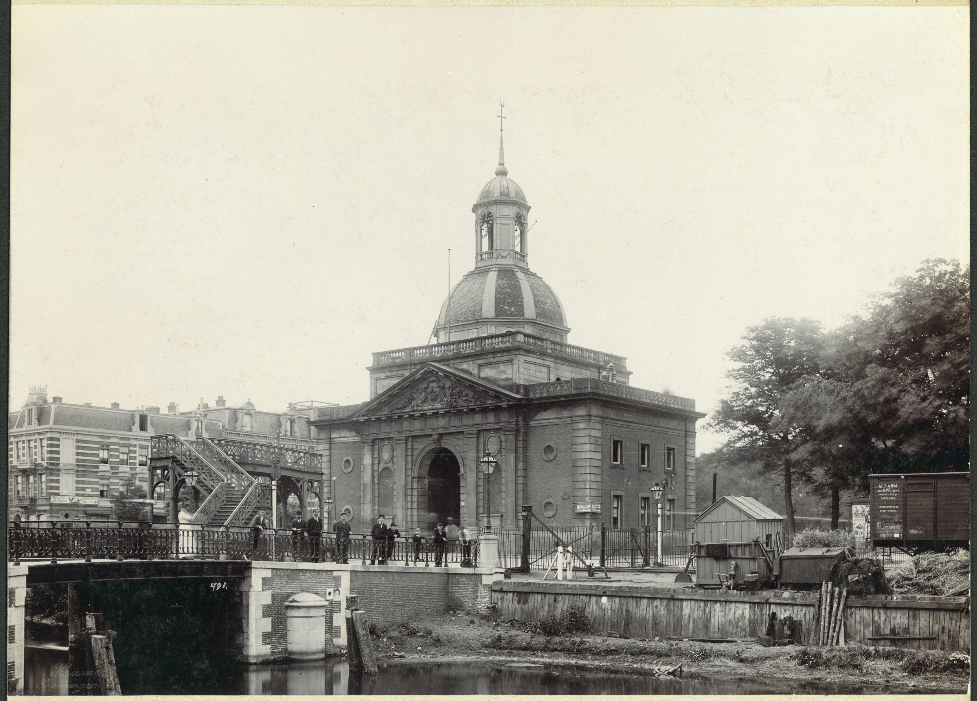 Muiderpoort: De Muiderpoort, gezien vanuit het westen; links een voetgangersbrug over het spoor (opmerking: Negatiefnummer kan een repronegatief aanduiden)